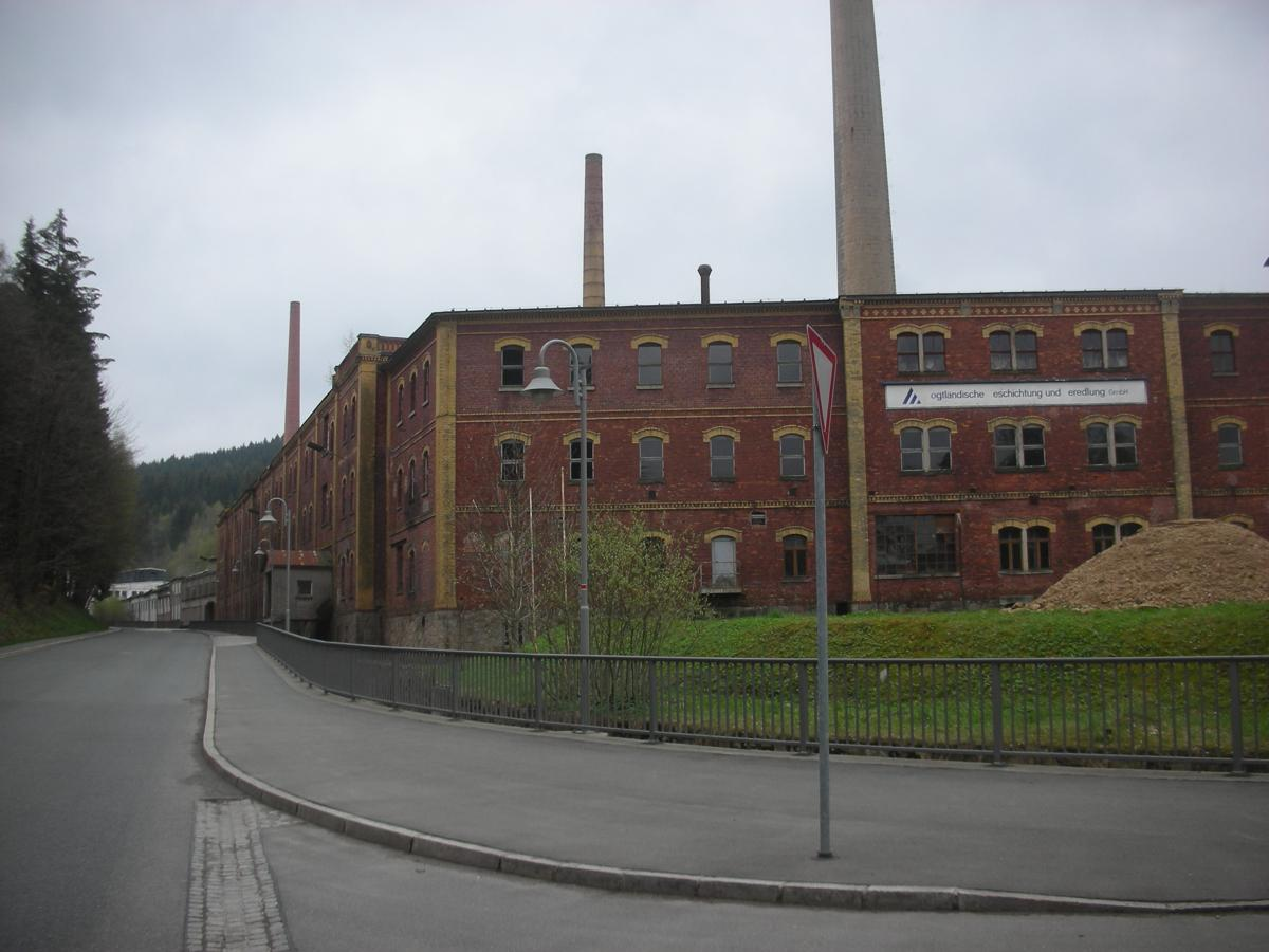 ehemaliger VEB Kunstleder in Tannenbergsthal